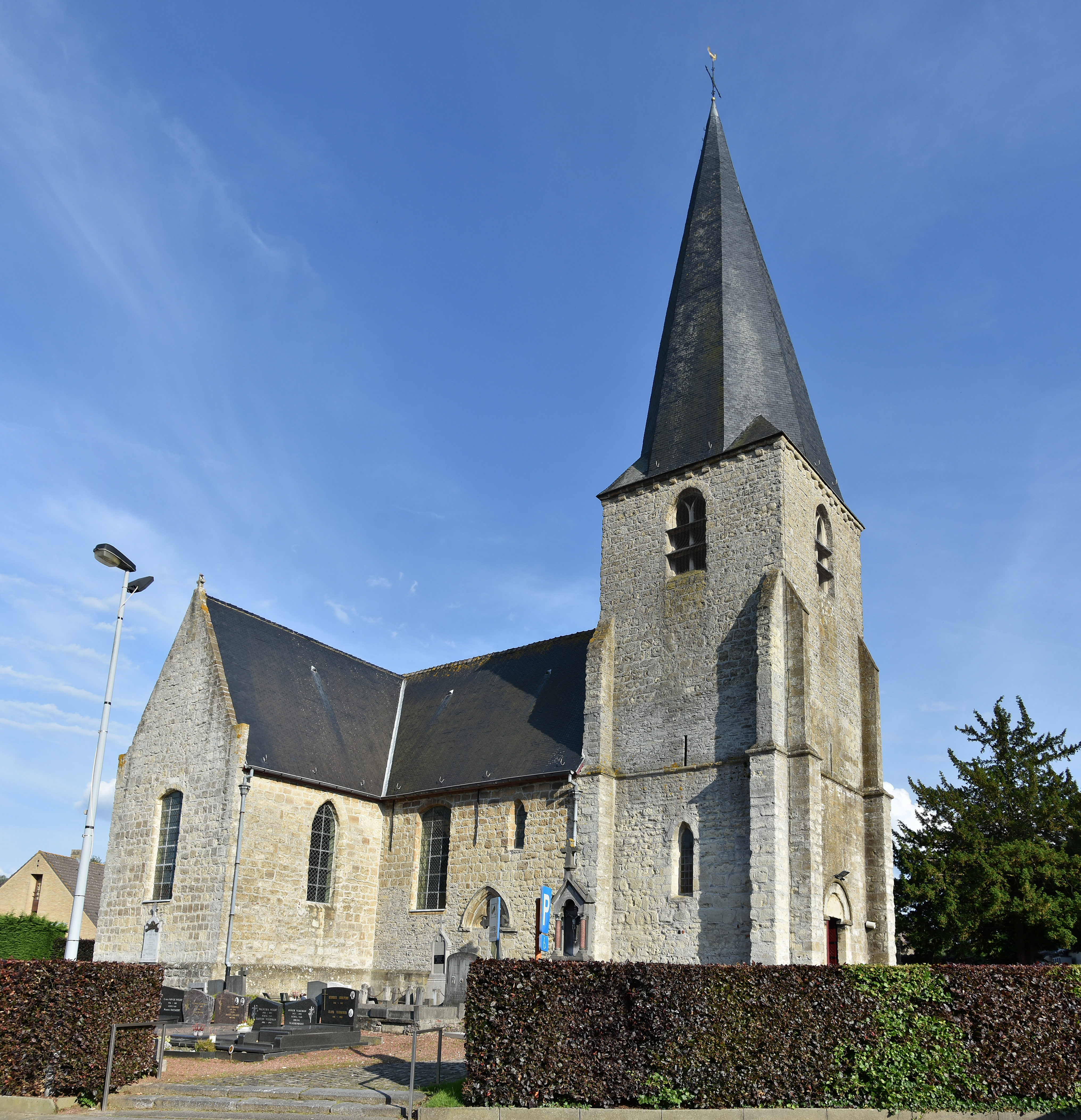 Sint-Agathakerk (Landskouter) 14-06-2019 19-08-01